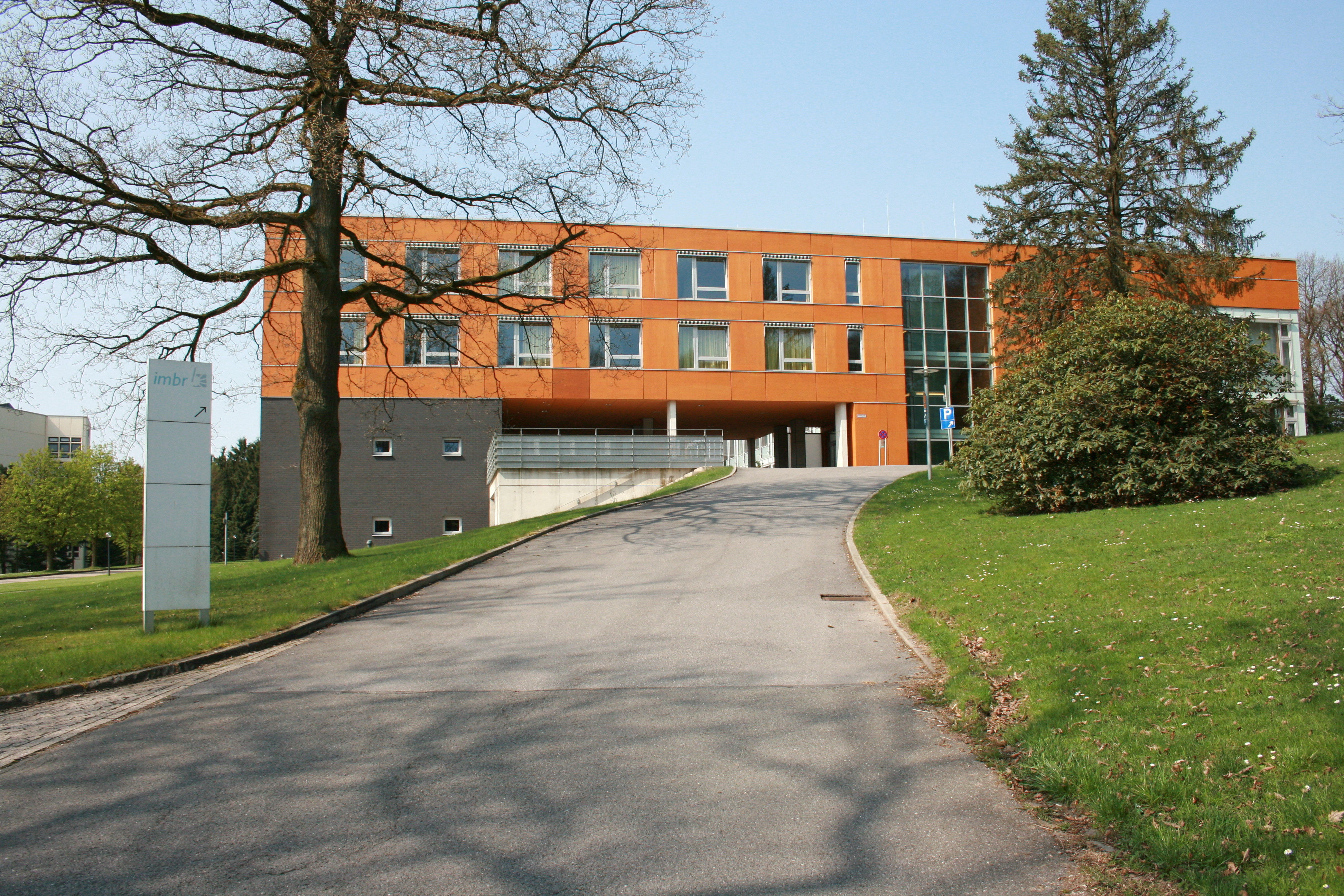 Institut für medizinischberufliche Rehabilitation, Im Saalscheid Nr. 8 in Wuppertal-Ronsdorf